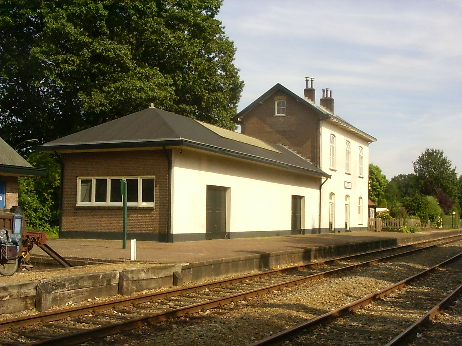 Station Eerbeek, bouwjaar 1886, gemeentelijk monument sinds 12 juli 1988